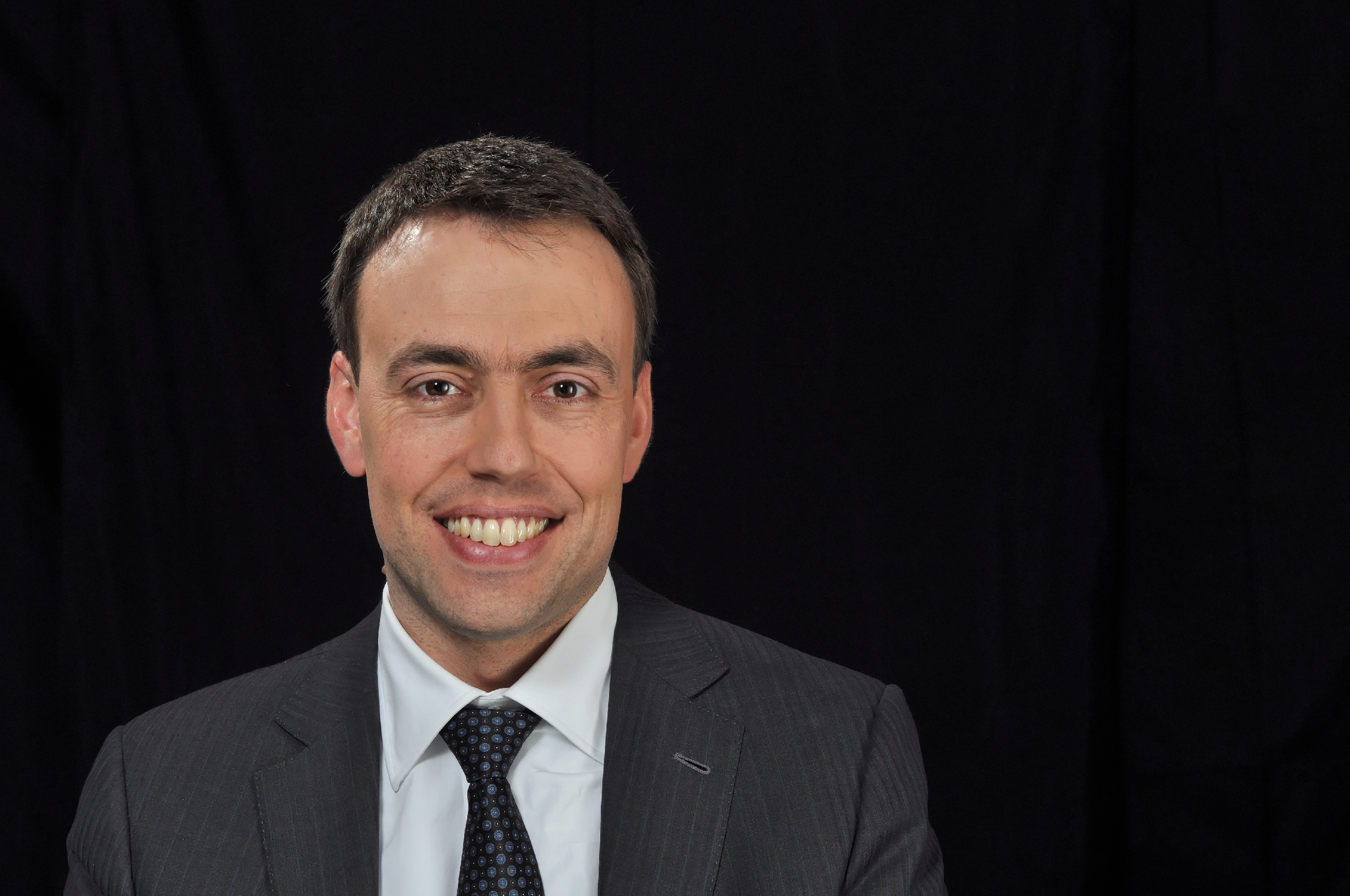 Nils Schmid 2013 Personality rights warningAlthough this work is freely licensed or in the public domain, the person(s) shown may have rights that legally restrict certain re-uses unless those depicted consent to such uses. In these cases, a model release or other evidence of consent could protect you from infringement claims.